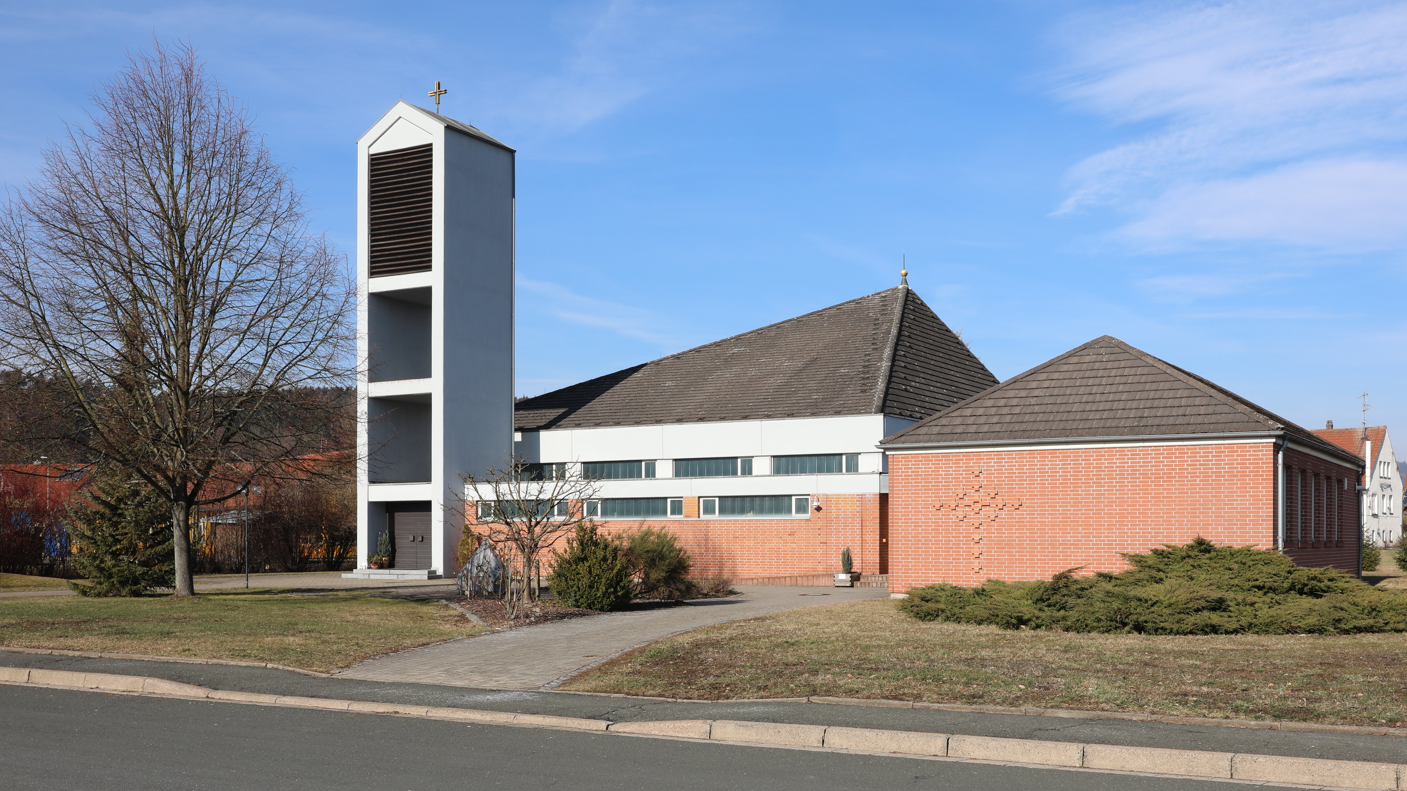 St. Johannes der Täufer in Haßlach bei Kronach